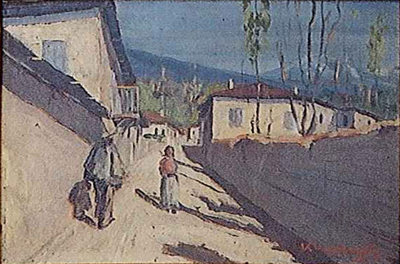 Εργο πρώτης περιόδου